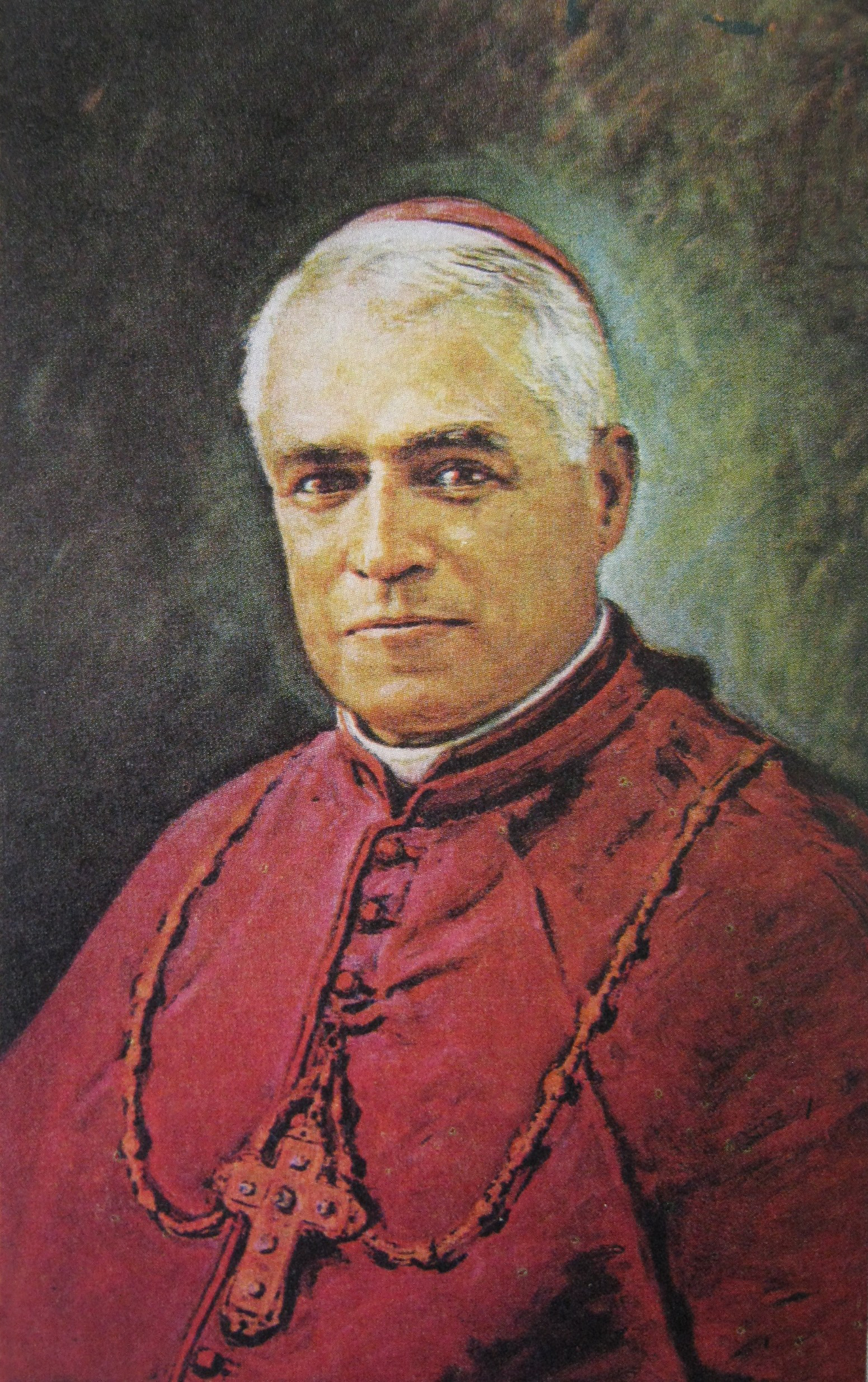 Fotografía del cuadro de mons. Tiberio de Jesús Salazar y Herrera, arzobispo de Medellín entre 1935 y 1942. Fundador la Universidad Pontificia Bolivariana -UPB-.